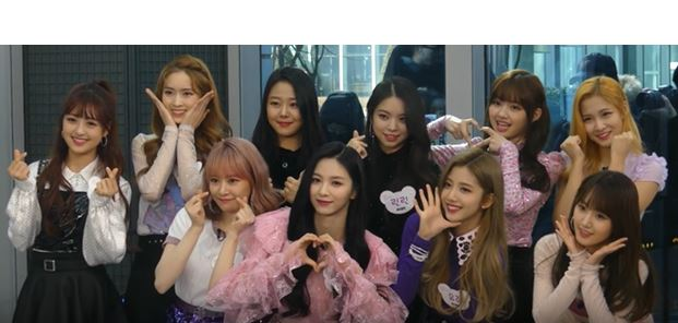 29일 오후 서울시 마포구 상암동 tbs 오픈스튜디오에서 팩트인스타 스타인터뷰가 열려 체리블렛(해윤, 유주, 미래, 보라, 지원, 코코로, 레미, 채린, 린린, 메이)이 녹화에 참여해 포즈를 취하고 있다. 팩트인스타 #체리블렛 #CherryBullet #해윤 #유주 #미래 #보라 #지원 #코코로 #레미 #채린 #린린 #메이 팩트인스타, 체리블렛, Cherry Bullet, 해윤, 유주, 미래, 보라, 지원, 코코로, 레미, 채린, 린린, 메이